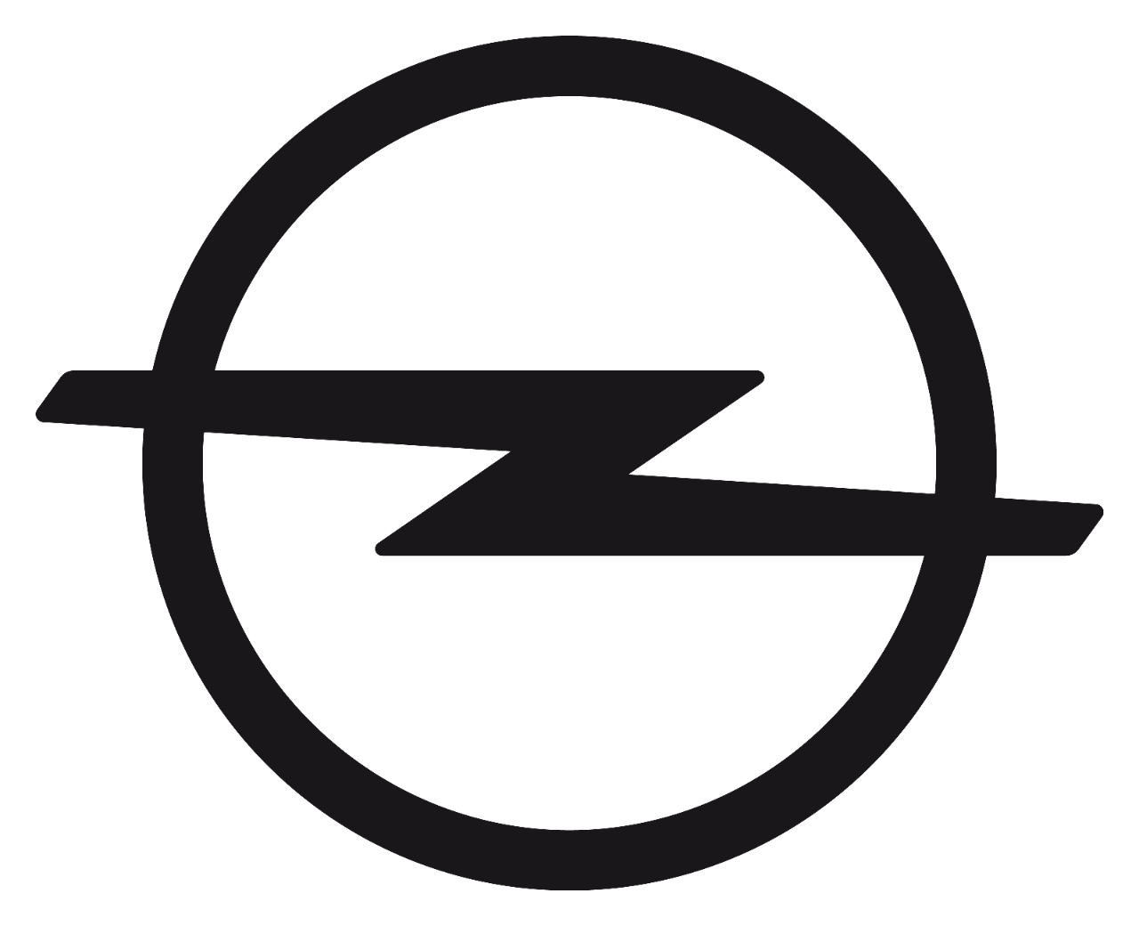 Neues Opel-Logo, vorgestellt am 13. Juni 2017 (zusammen mit dem neuen Slogan: „Die Zukunft gehört allen“).